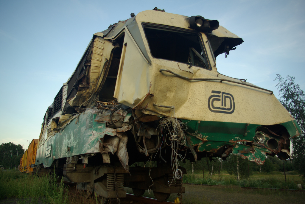 Lokomotiva 151.018-9 po tragické železniční nehodě ve Studénce (11.8.2008). Strojvedoucímu se podařilo spuštěním rychlobrzdy snížit rychlost vlaku EC 108 Comenius z 134 km/h na 90 km/h a díky útěku do strojovny utrpěl při nárazu do zříceného betonového mostu pouze lehká zranění.